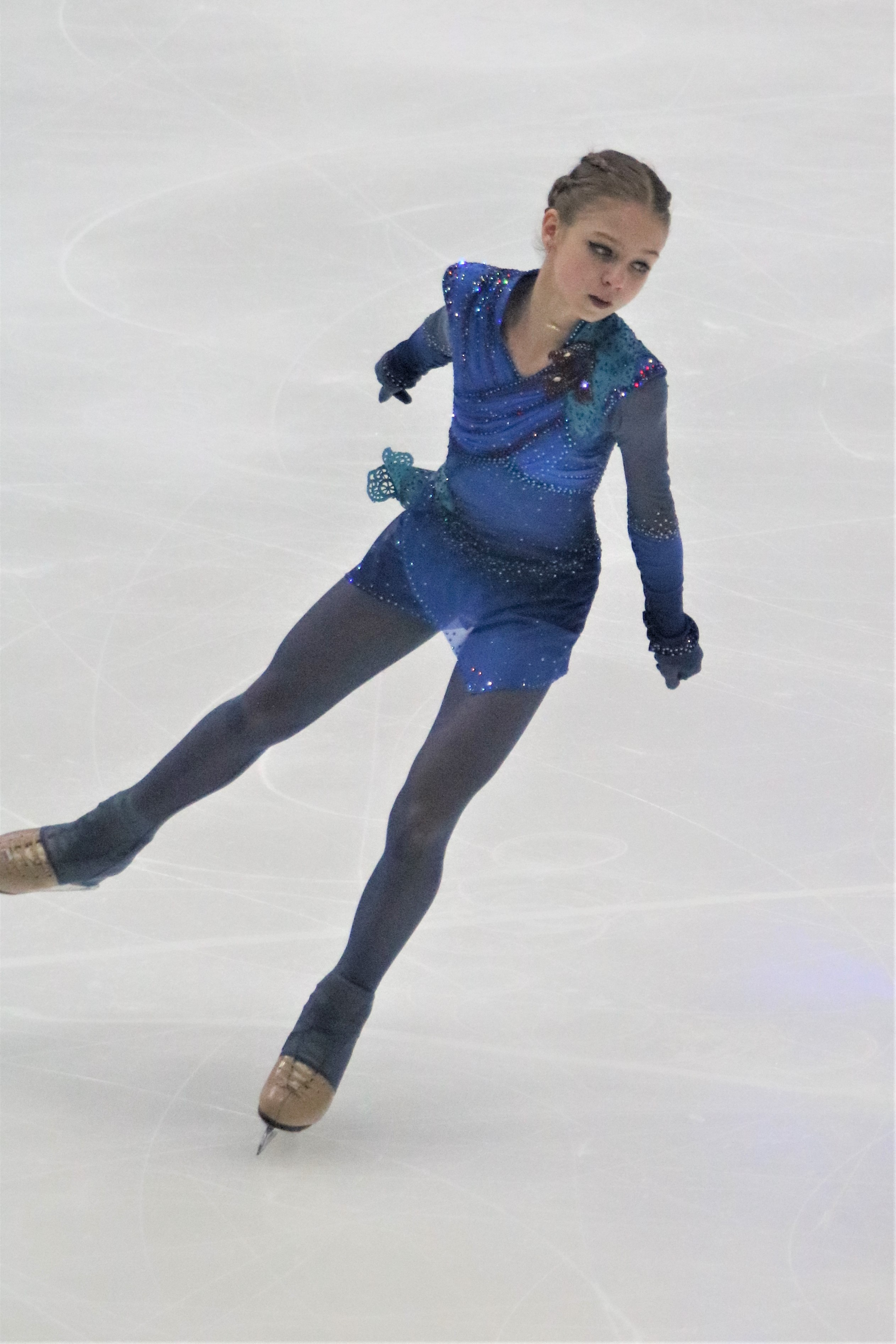 Александра Трусова (Россия) на Rostelecom Cup 2019